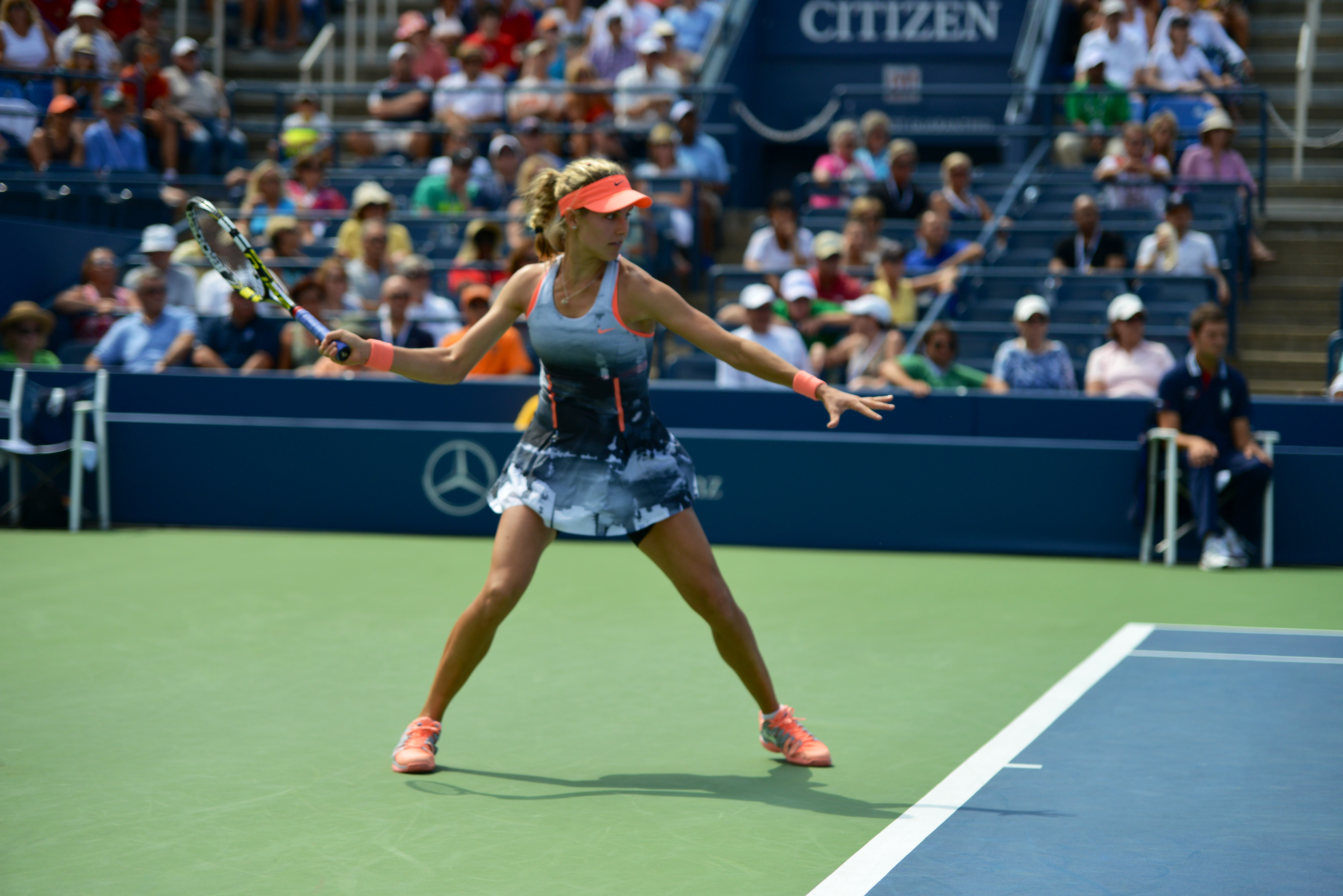 US Open 2013